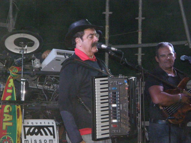 O ano de 2008 fica para sempre como um marco histórico nas festas do Pereiro. A presença de Quim Barreiros foi a razão...